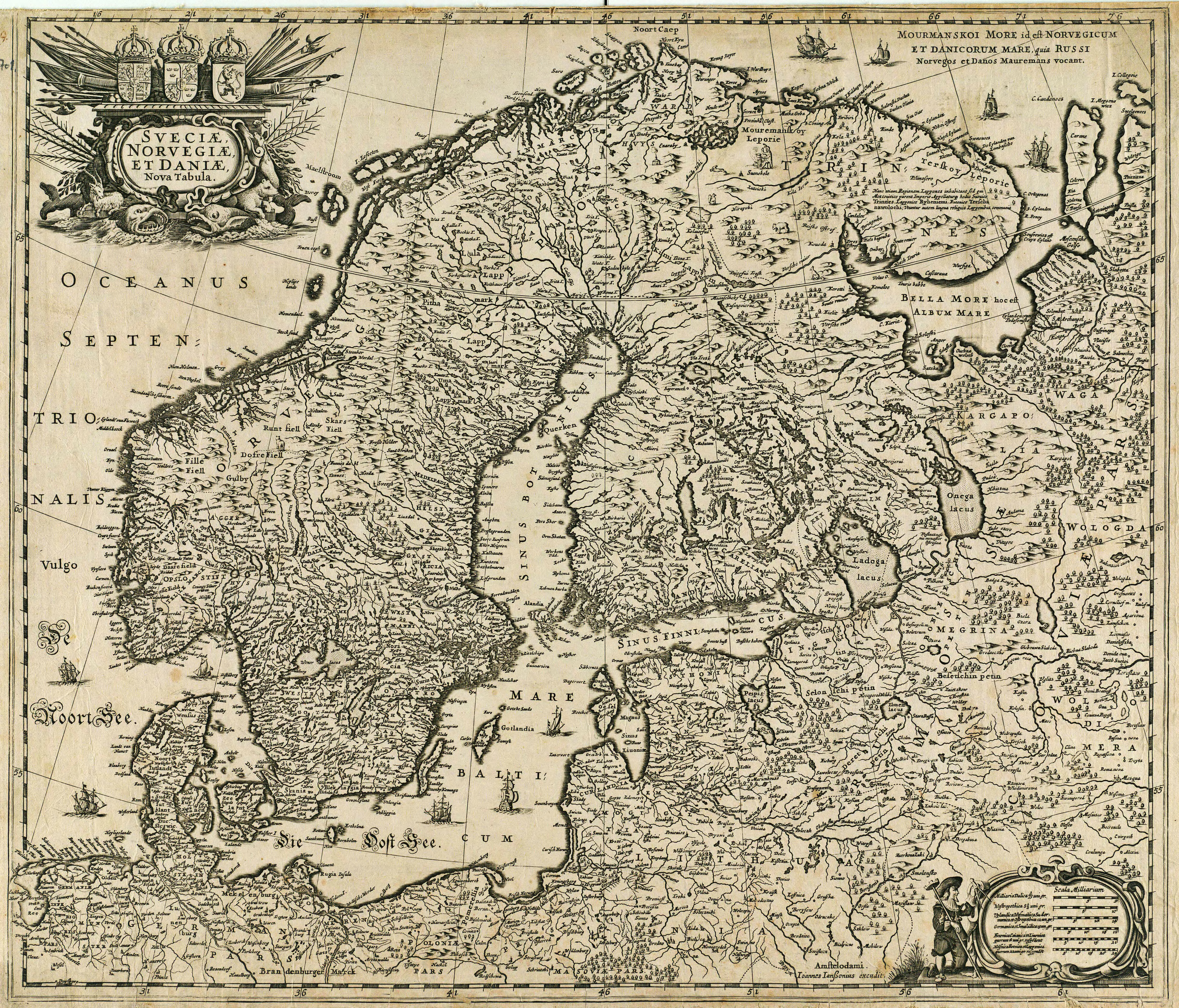 Kaart van Scandinavië door Janssonius